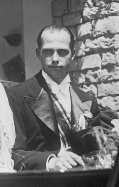 Title: Rumänien, Hochzeit im Königshaus People in the image: Ileana von Rumänien *Anton von Österreich-Toskana Factual corrections and alternative descriptions are encouraged separately from the original description. Additionally errors can be reported at this page to inform the Bundesarchiv. Original historic description: Die grosse Hochzeit im rumänischen Königshaus! Das glückliche Brautpaar nach der Trauung in der Galakutsche, Prinzessin Ileana und Herzog Anton von Habsburg.